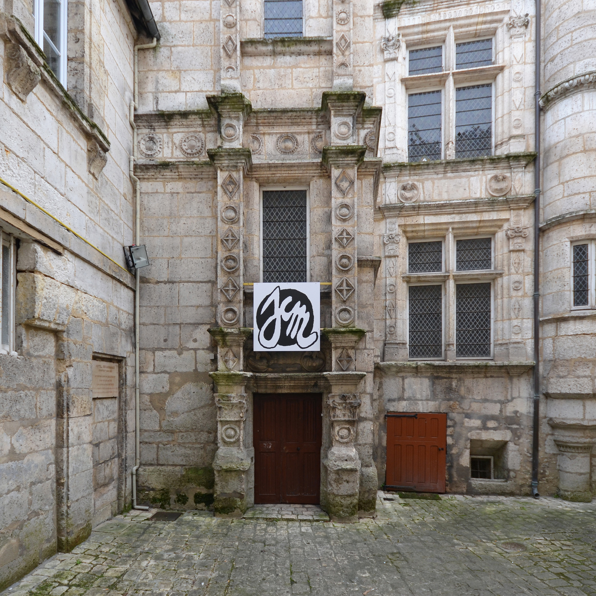 Entrée de l'exposition Jean-Christophe Menu, Festival International de la Bande Dessinée d'Angoulême 2016.